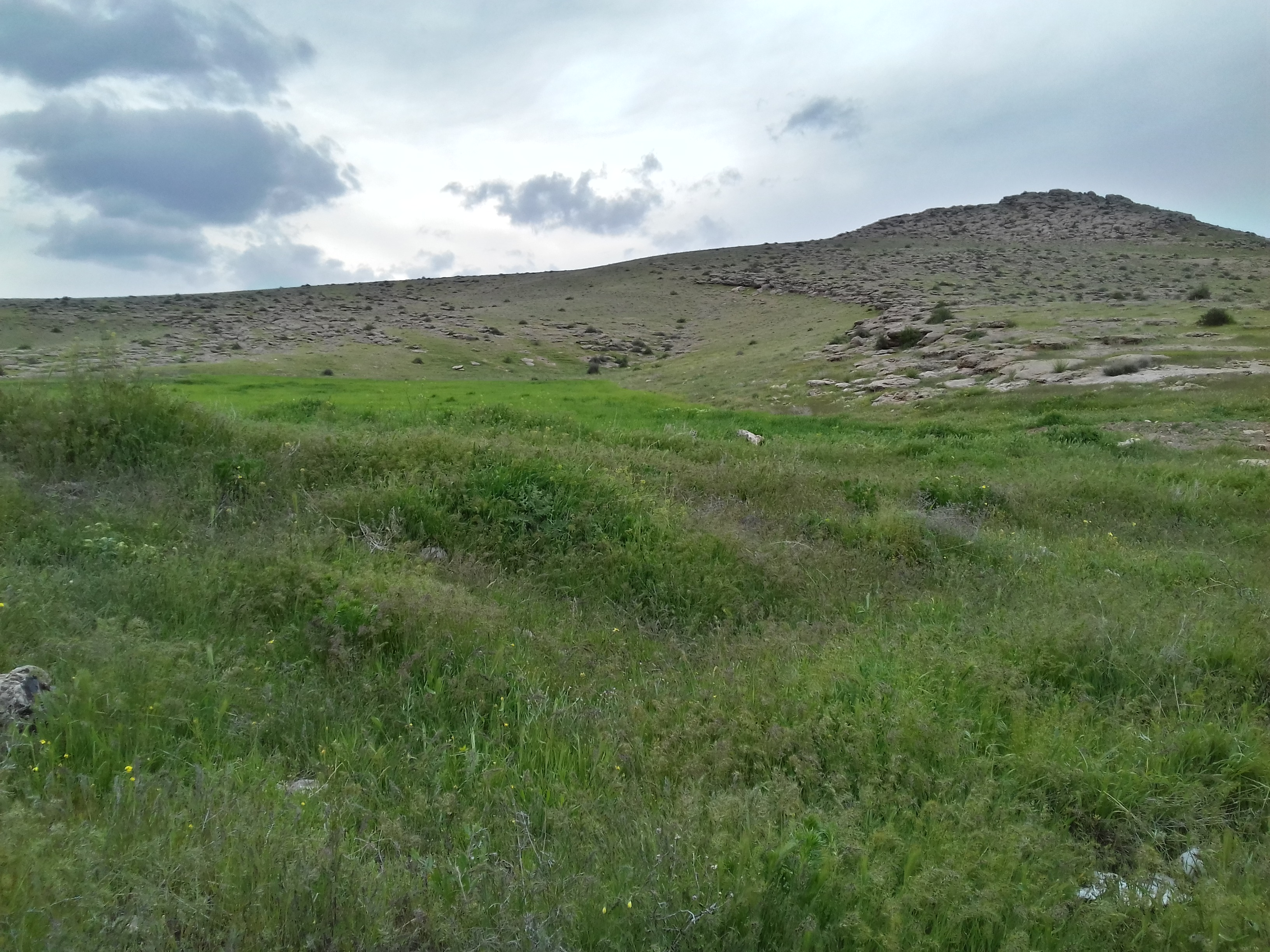 تصاویری از حومه روستای نجف آباد ارومیه، شامل طبیعت بکر و ورودی و... را مشاهده میکنید